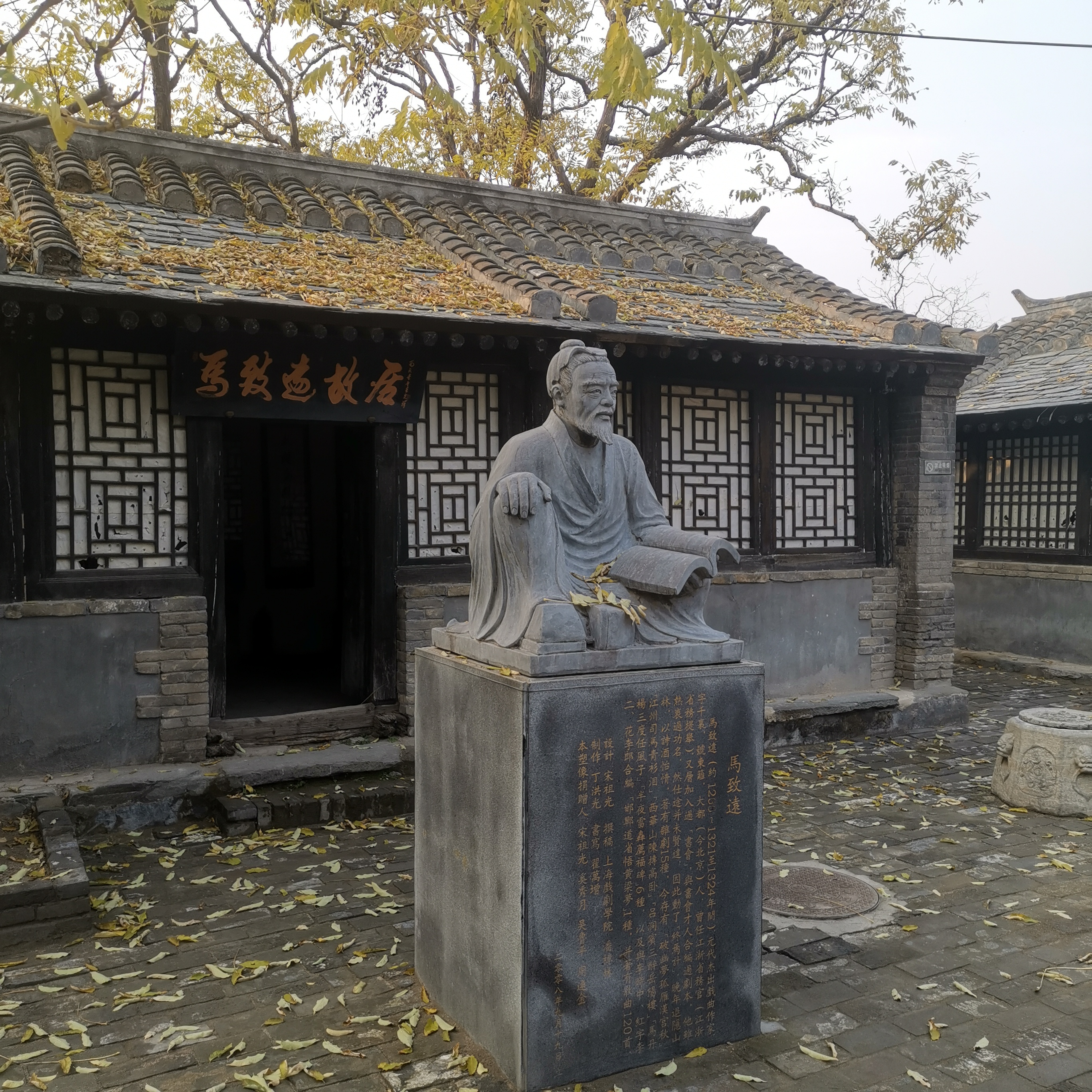 中文（中国大陆）: 马致远故居